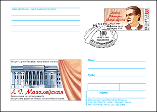 Любоў Iванаўна Мазалеўская